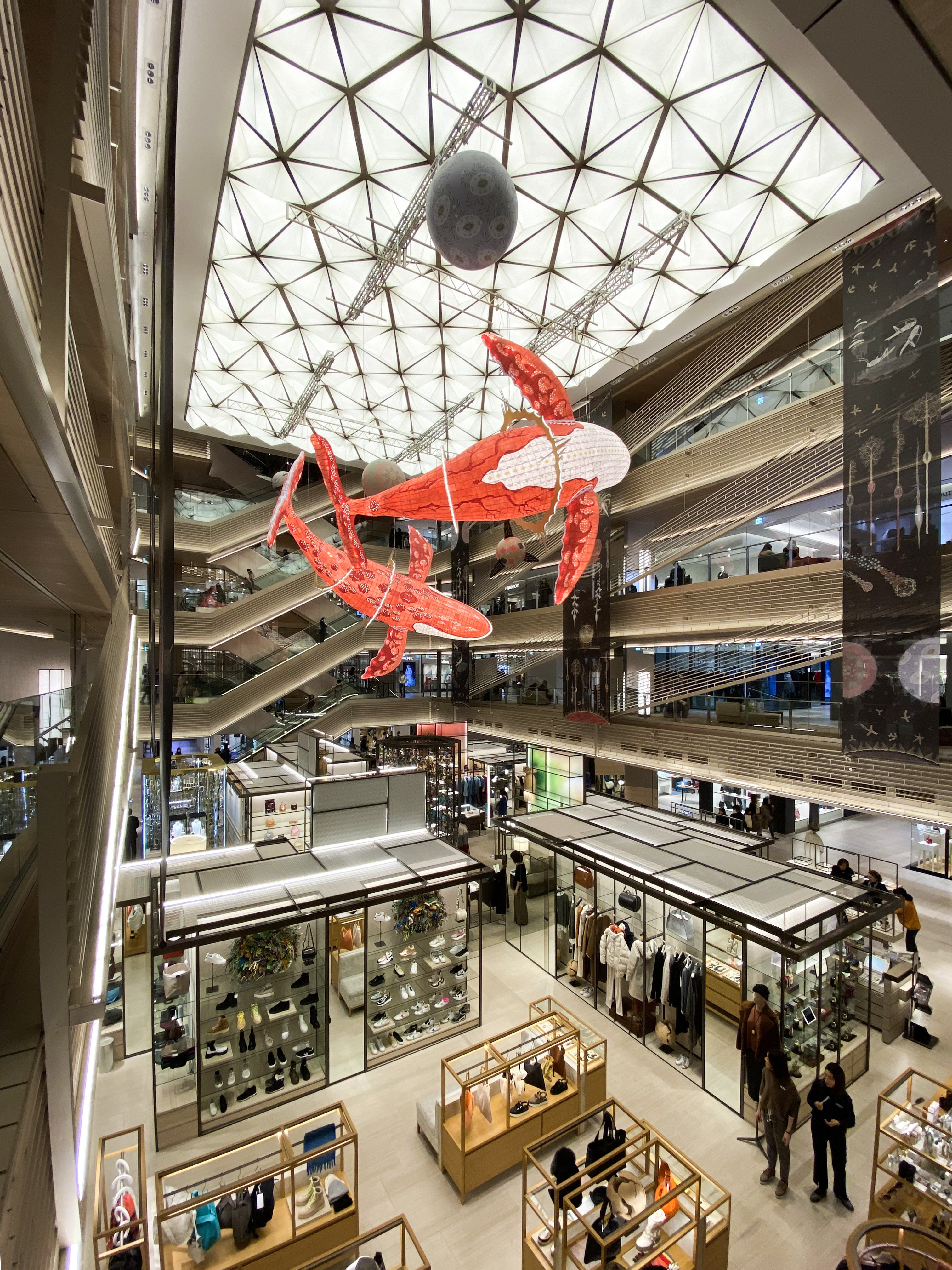 GINZA SIX Atrium